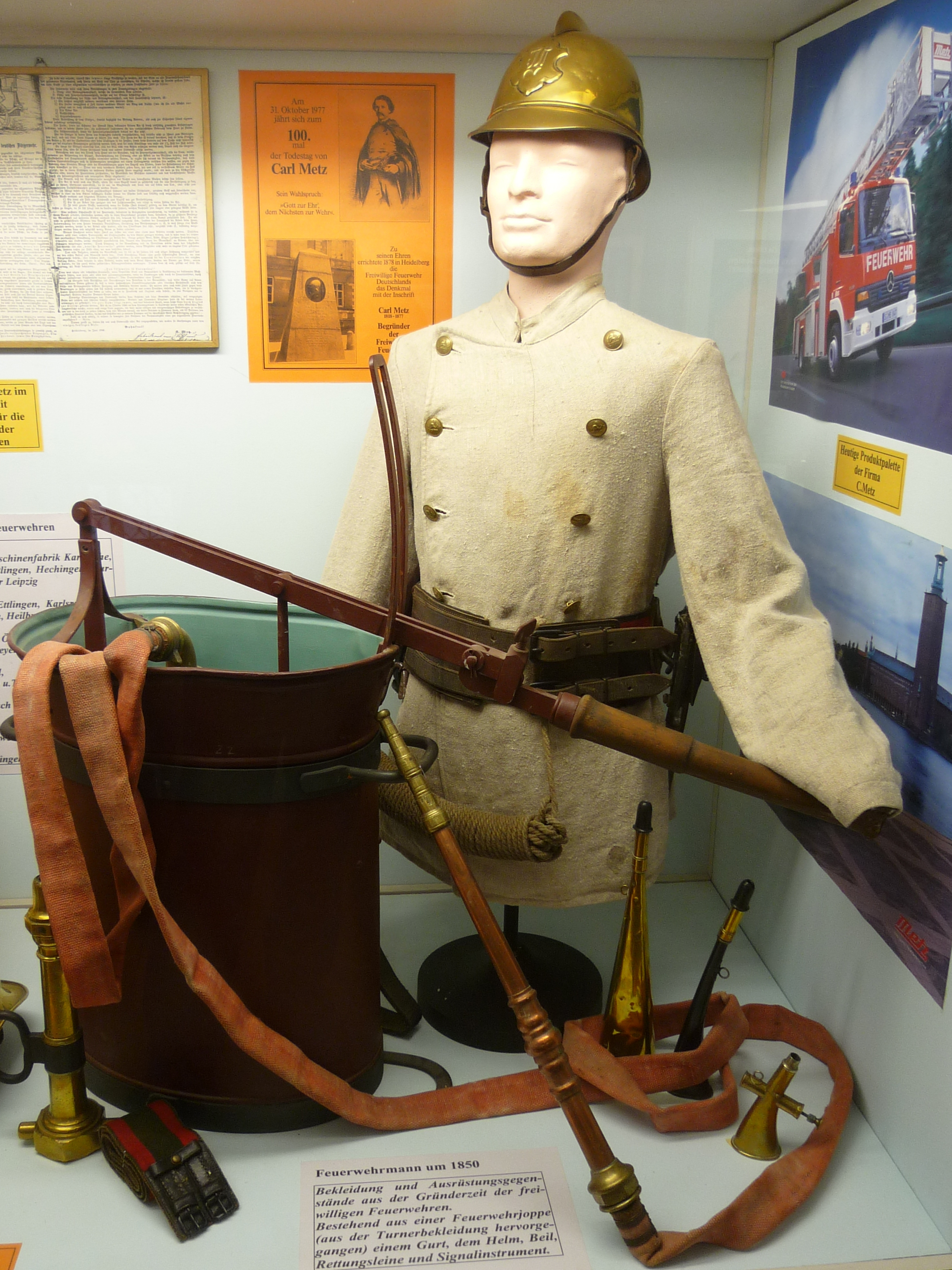 Feuerwehrmann aus der Zeit um 1850 mit Feuerwehrjoppe, Gurt, Helm, Beil, Rettungsleine und Signalinstrumen im Feuerwehrmuseum zu Salem am Bodensee